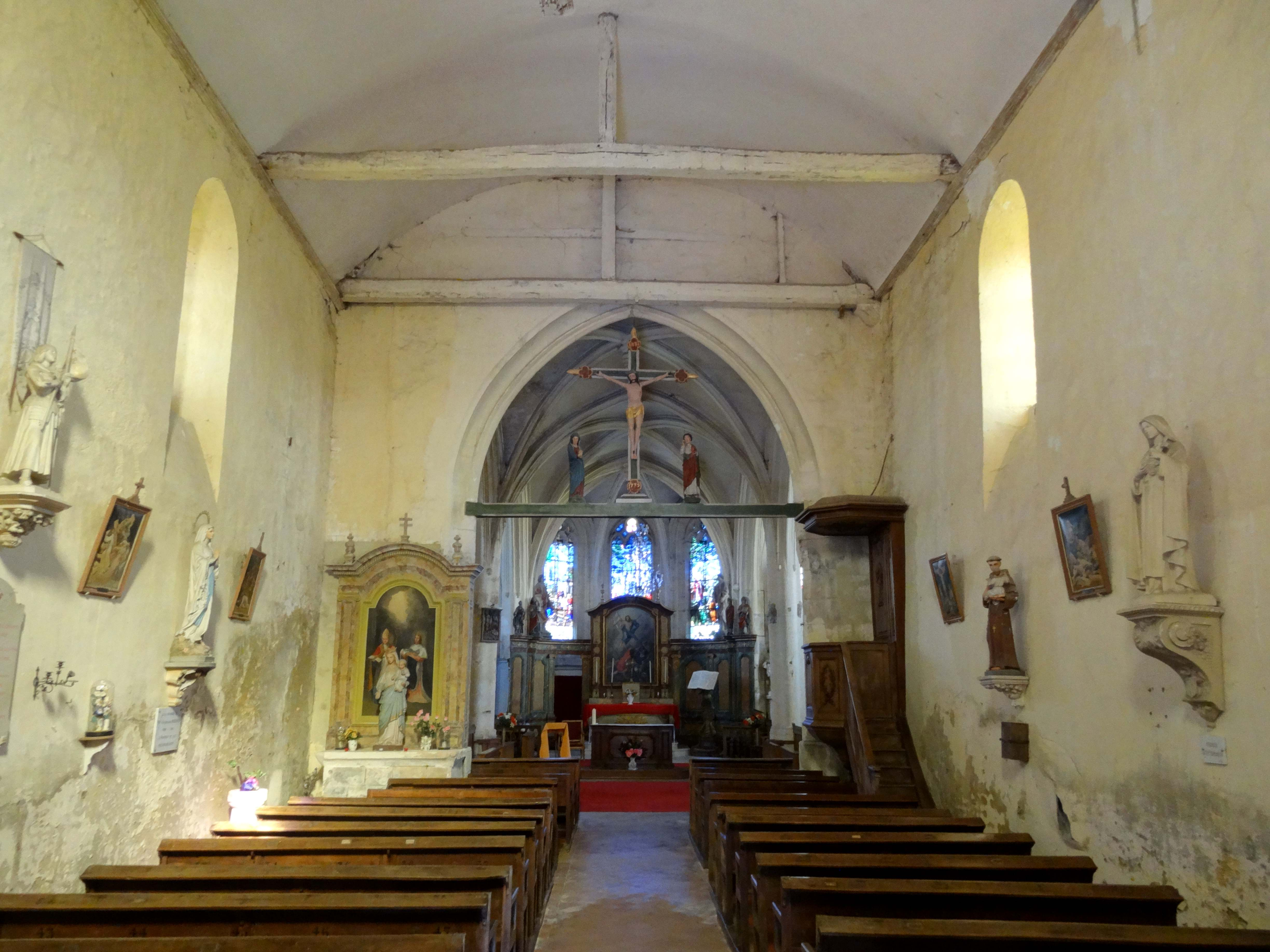 Intérieur de l'église - voir titre.